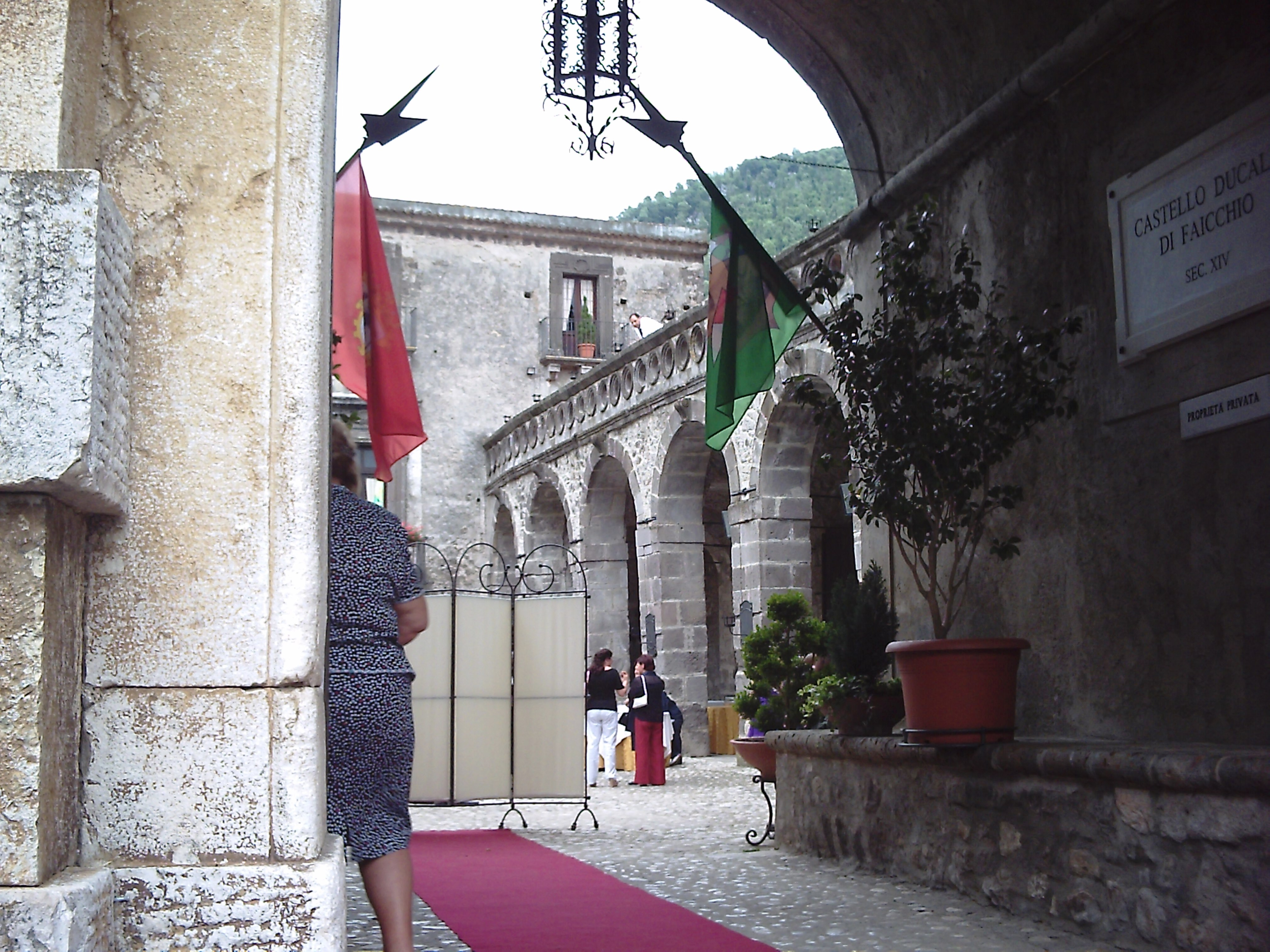 Cortile interno del Castello Ducale di Faicchio (Bn)